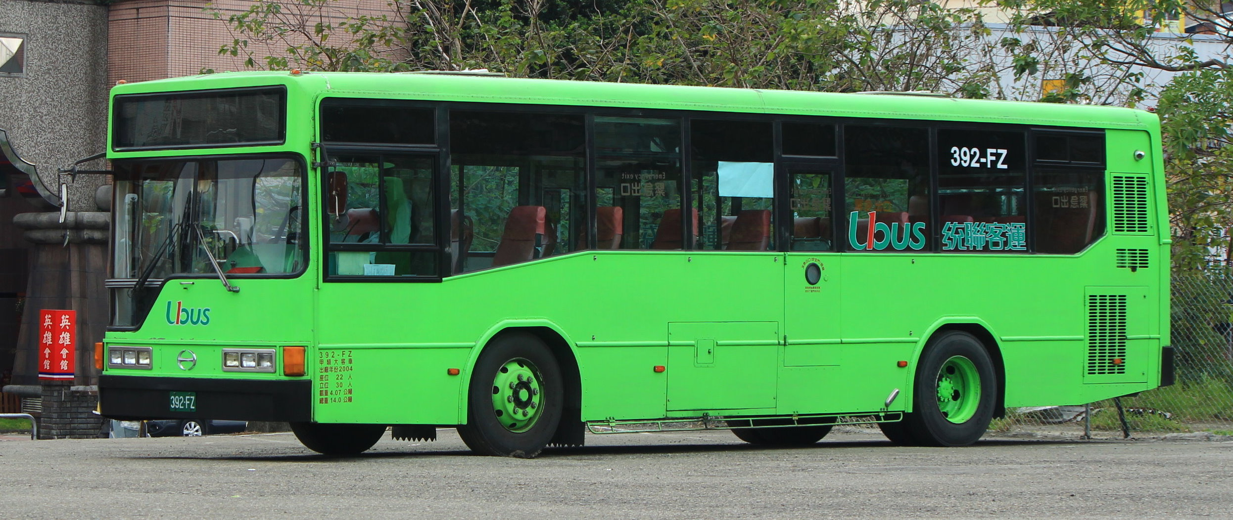 統聯客運2004年日野ERK2JML大客車392-FZ休息中。